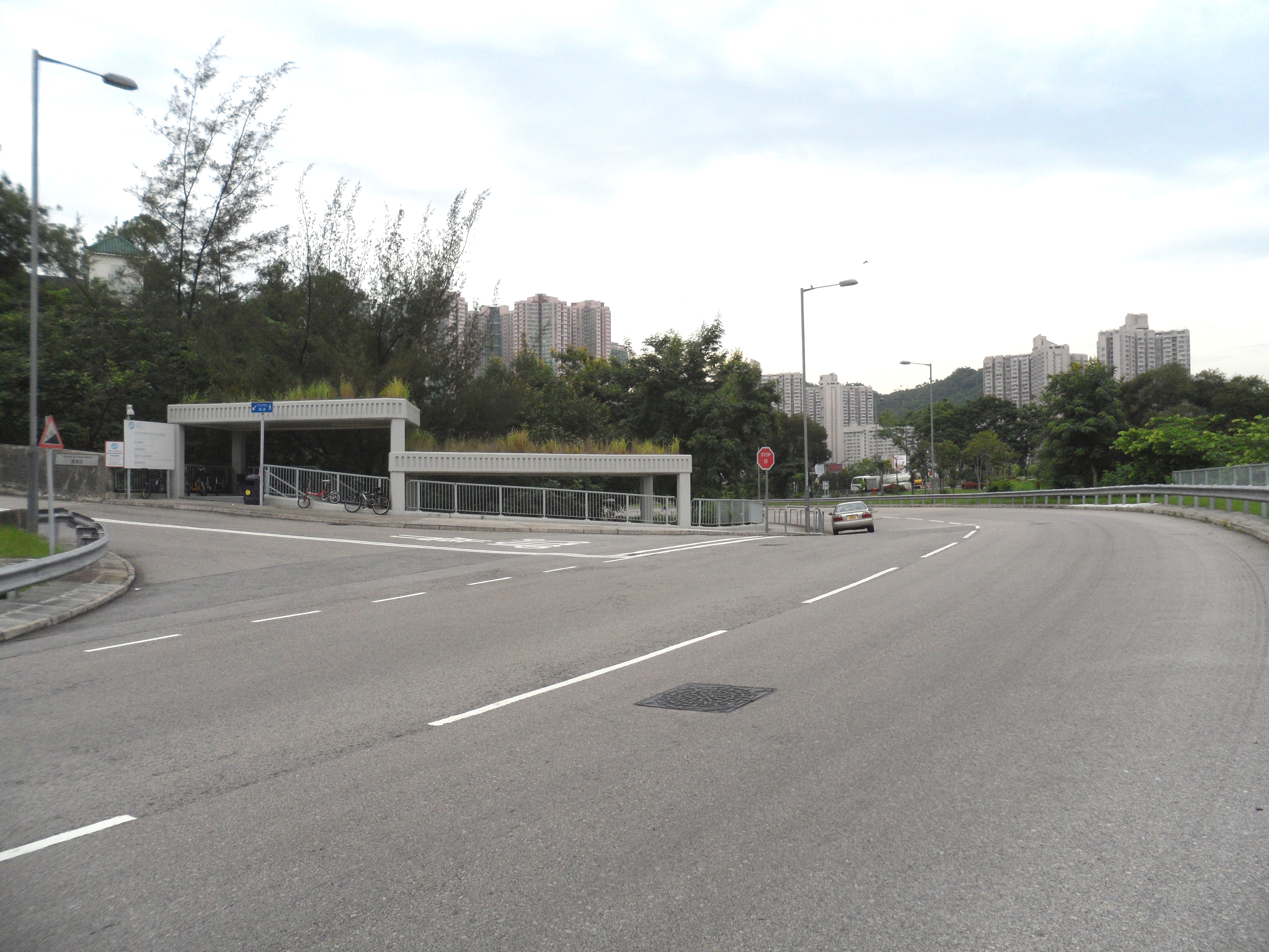 中文（香港）: 靈實路與靈康路交界。